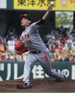 Giants_utsumi_26